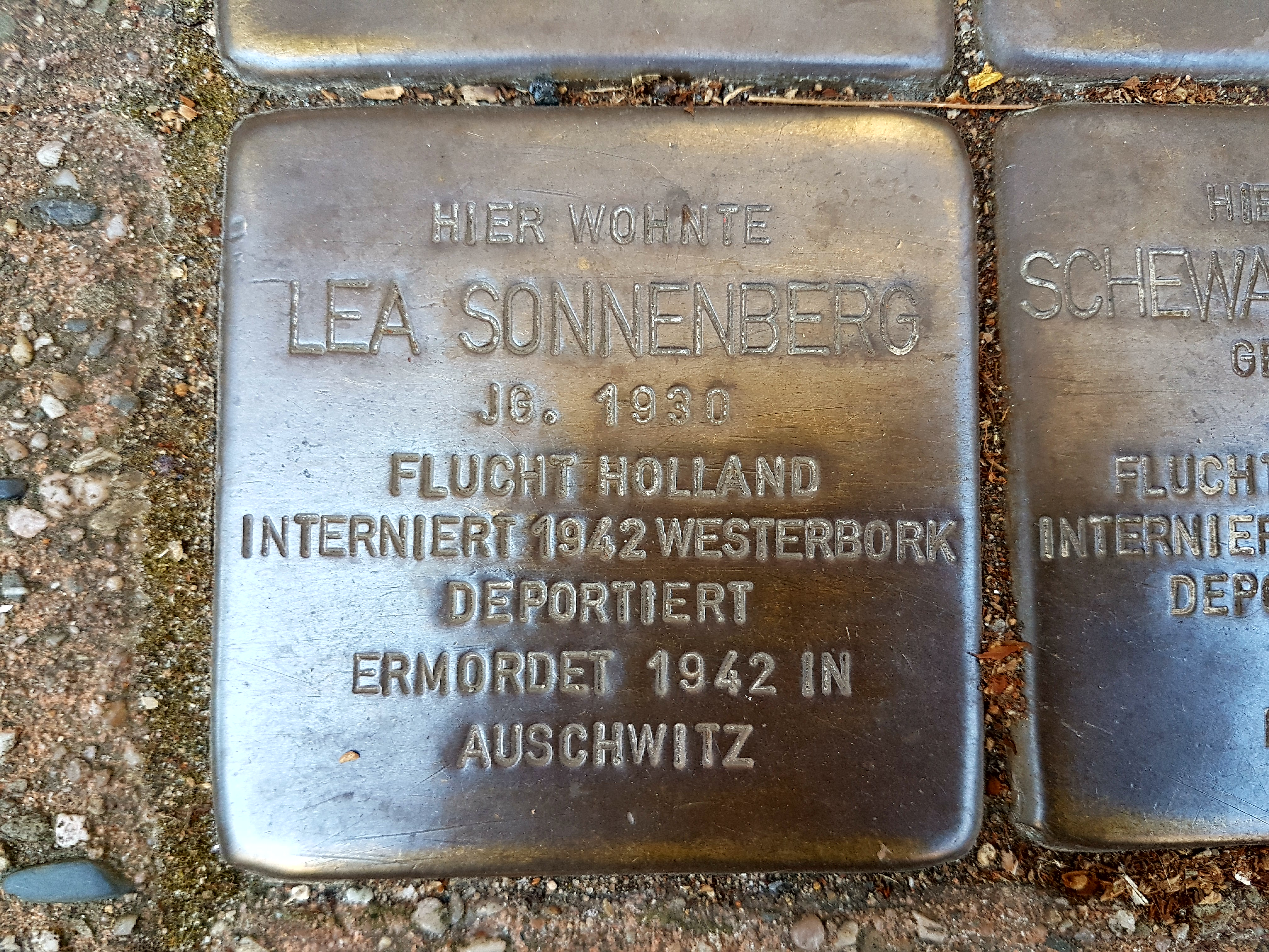 Lea Sonnenberg Stolpersteine Duisburg